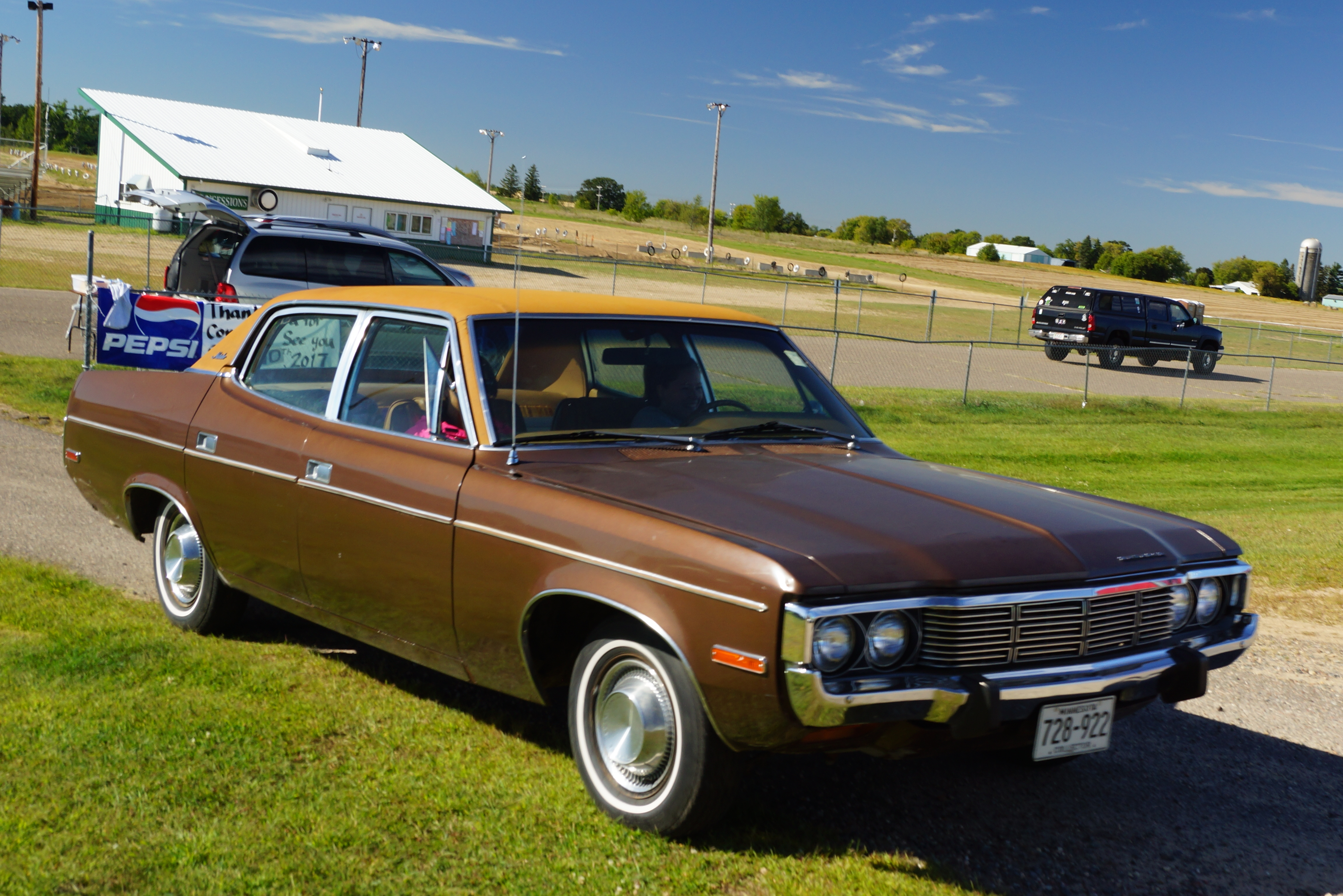 1973 AMC Matador